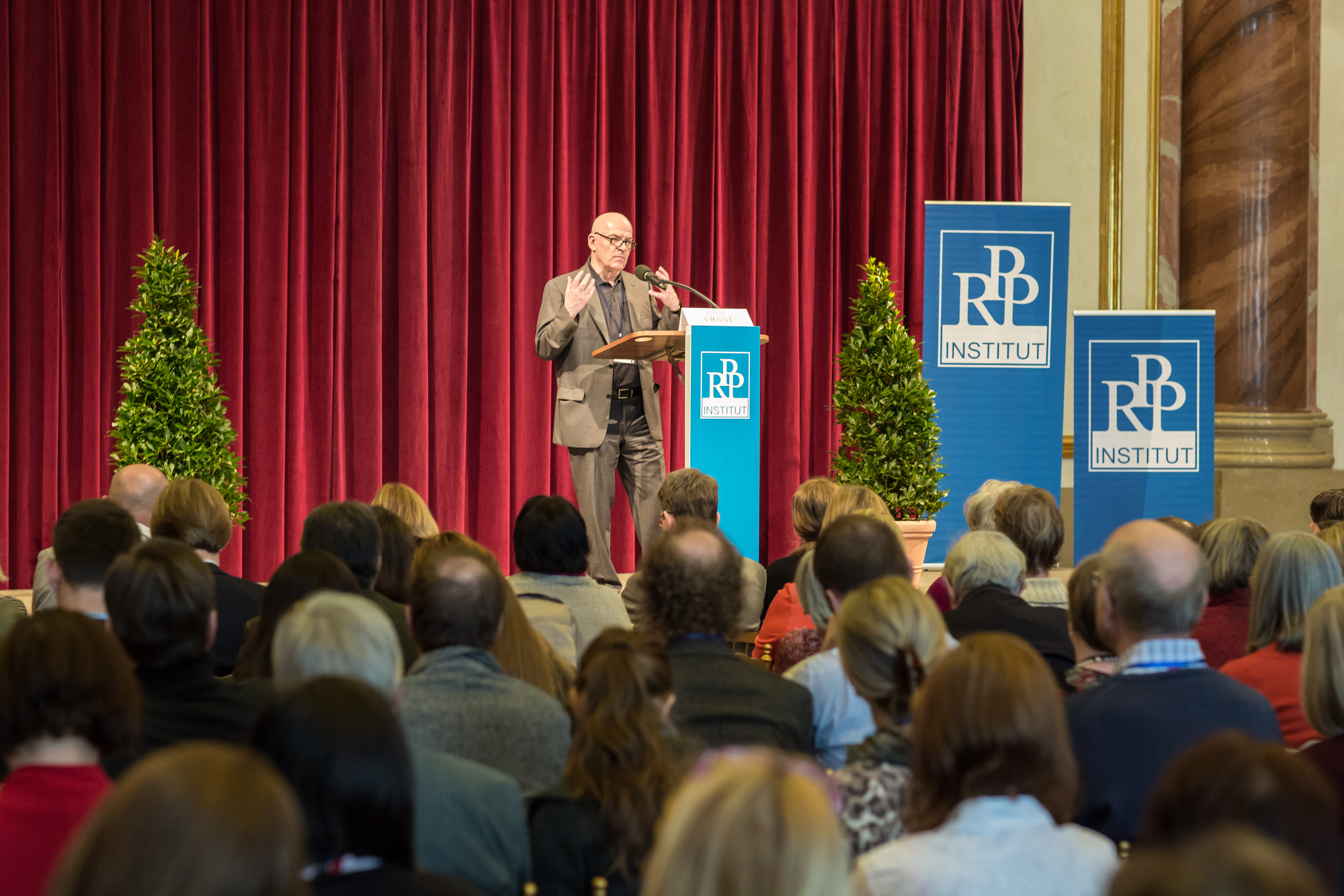 Heiko Ernst auf der Fachtagung des RPP-Institutes über "Glück und Seligkeit" am 20. April 2013 im Palais Liechtenstein (Fürstengasse)